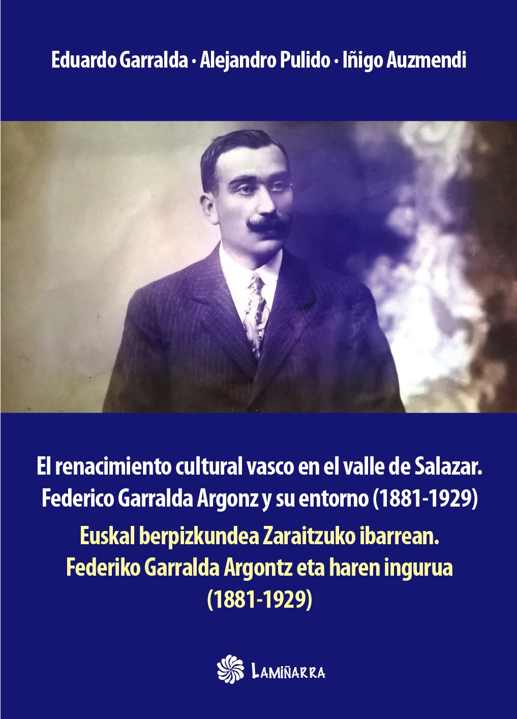 Federiko Garralda, Zaraitzuko euskaltzalea: «Xardoki anitz euskaraz alkerik gabe. Beti aurrer Euskaraz xardoki, eta guzien gañetik, orit Euskaraz minzatu zuela gure aita t’amak, eta kala nola ayek egin baitzien ayen aldez, egin biar ziena guri erakusteko, eta etzadien gal Euskarara; gisa berian eginzagun guk».